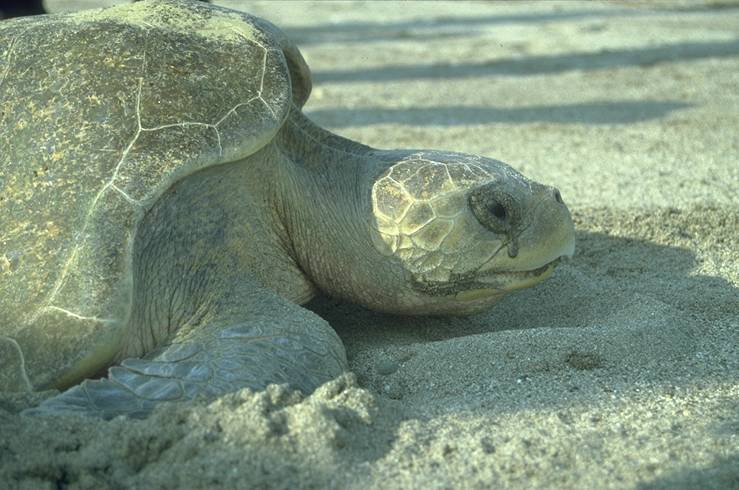 Meeresschildkröte bei Eiablage, Pazifik, Puerto Vallarta, Jalisco, Mexiko